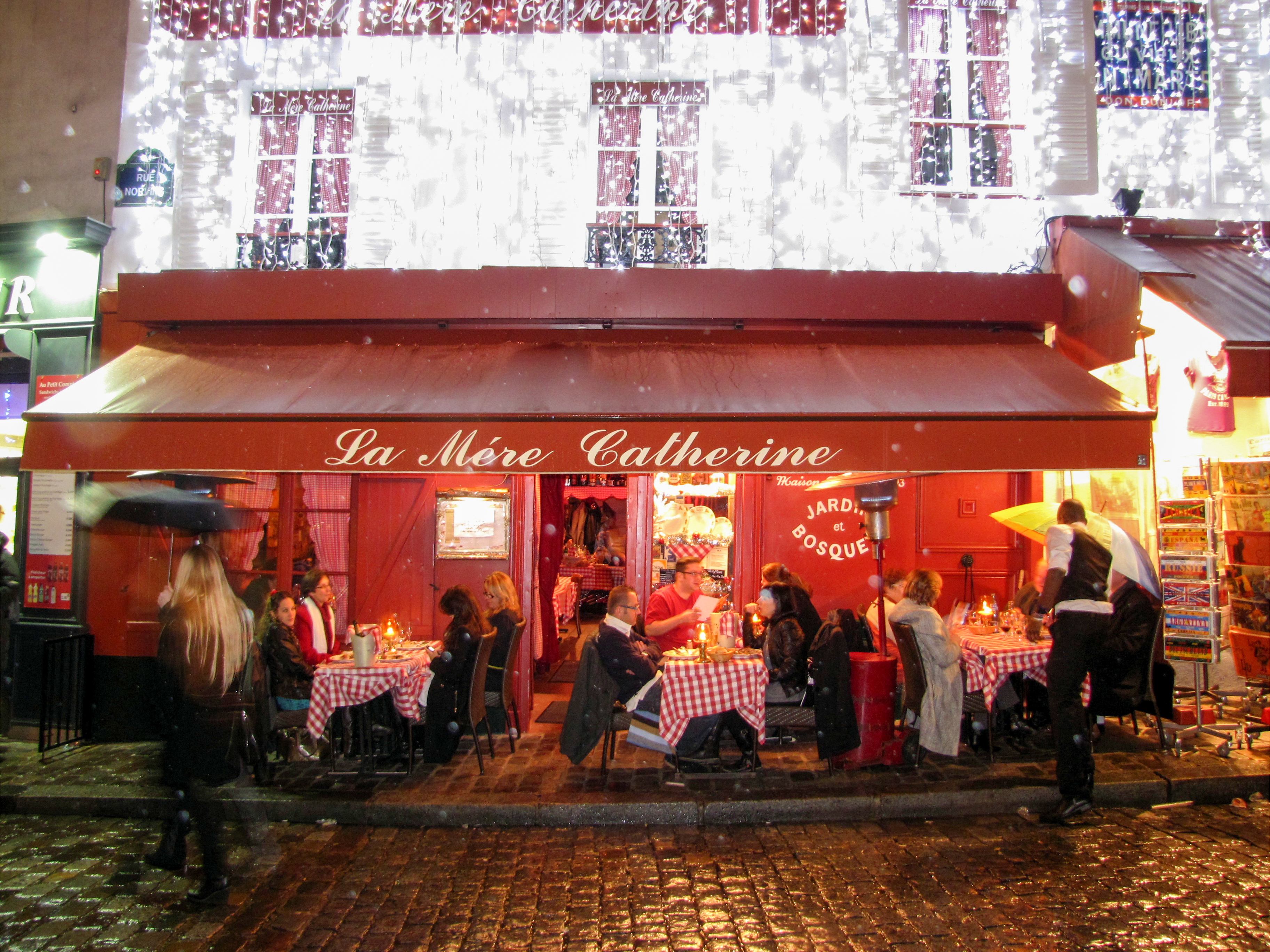 Париж